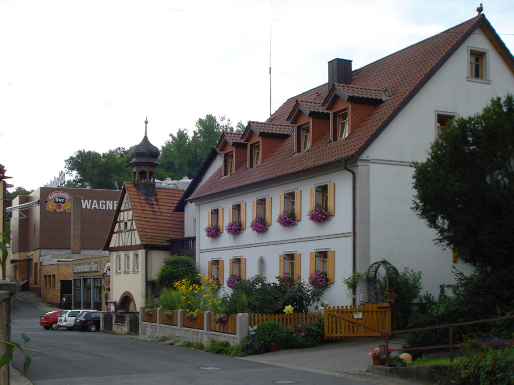 Eschenbach, Stadt Eltmann, BayernLinks im Bild (Gebäude mit Dachreiter) das ehemalige Rathaus des Ortes.